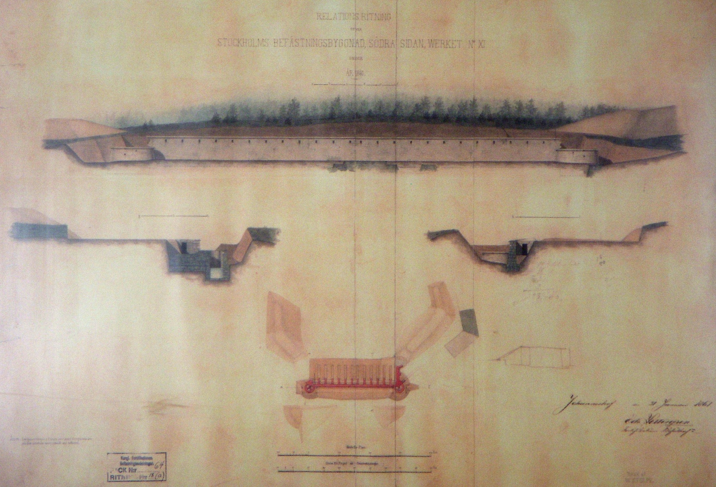 Johanneshovs skans, Stockholm, slutvärnet, "Relationsritning öfwer Stockholms besfästningsbyggnad, södra sidan, Werket No XI"